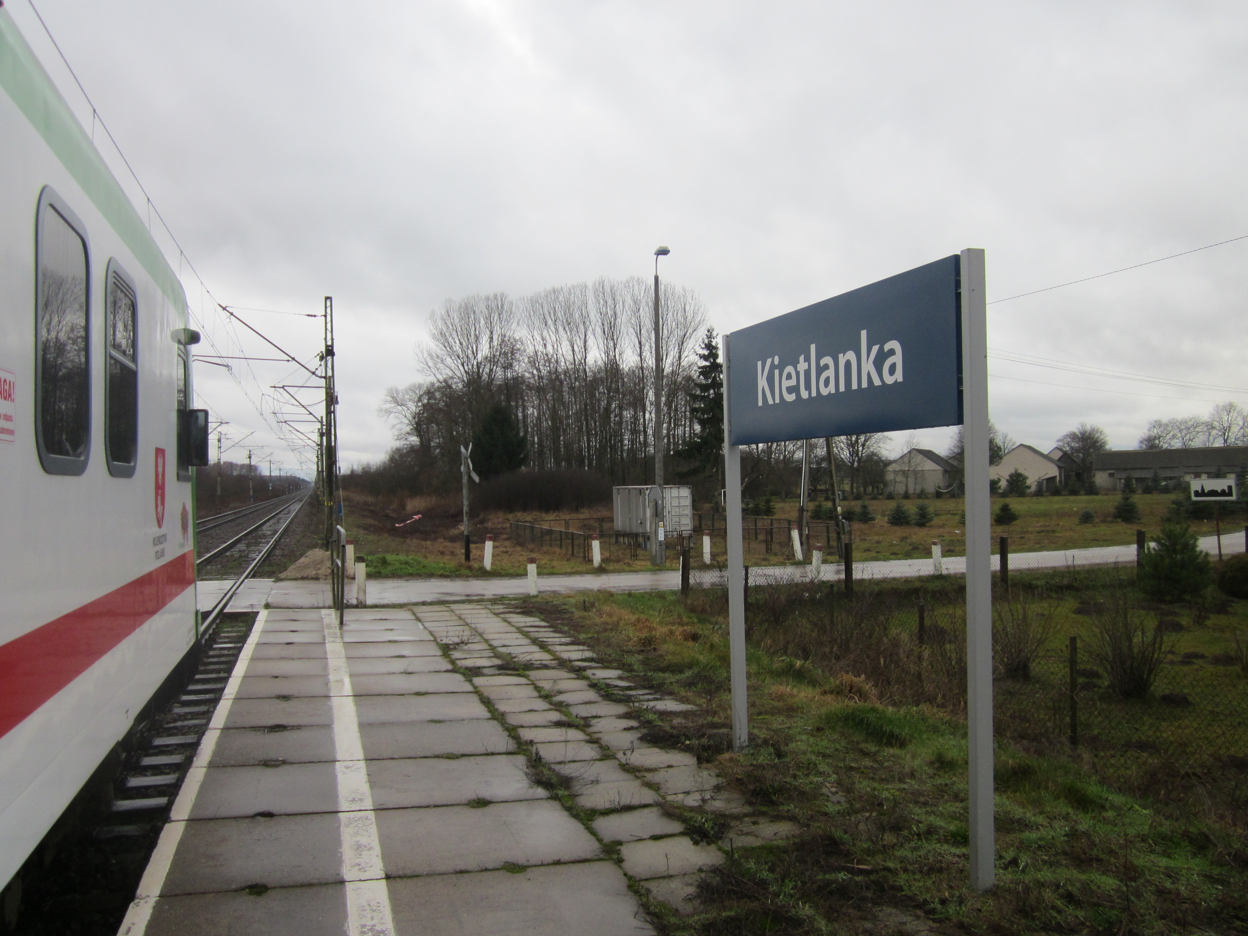 Zdjęcie zostało zrobione 12 stycznia 2014 roku podczas 22 finału WOŚP – przejazd specjalnym pociągiem WOŚP na trasie Szepietowo – Czyżew – Małkinia – Czyżew – Szepietowo.